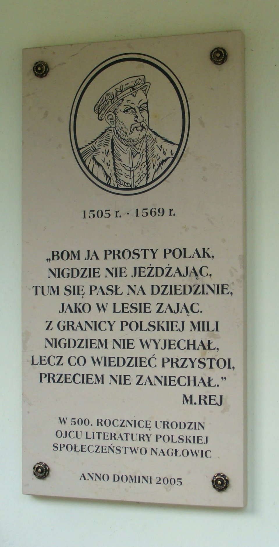 Tablica pamiątkowa pośw. Mikołajowi Rejowi na jego dworku w Nagłowicach